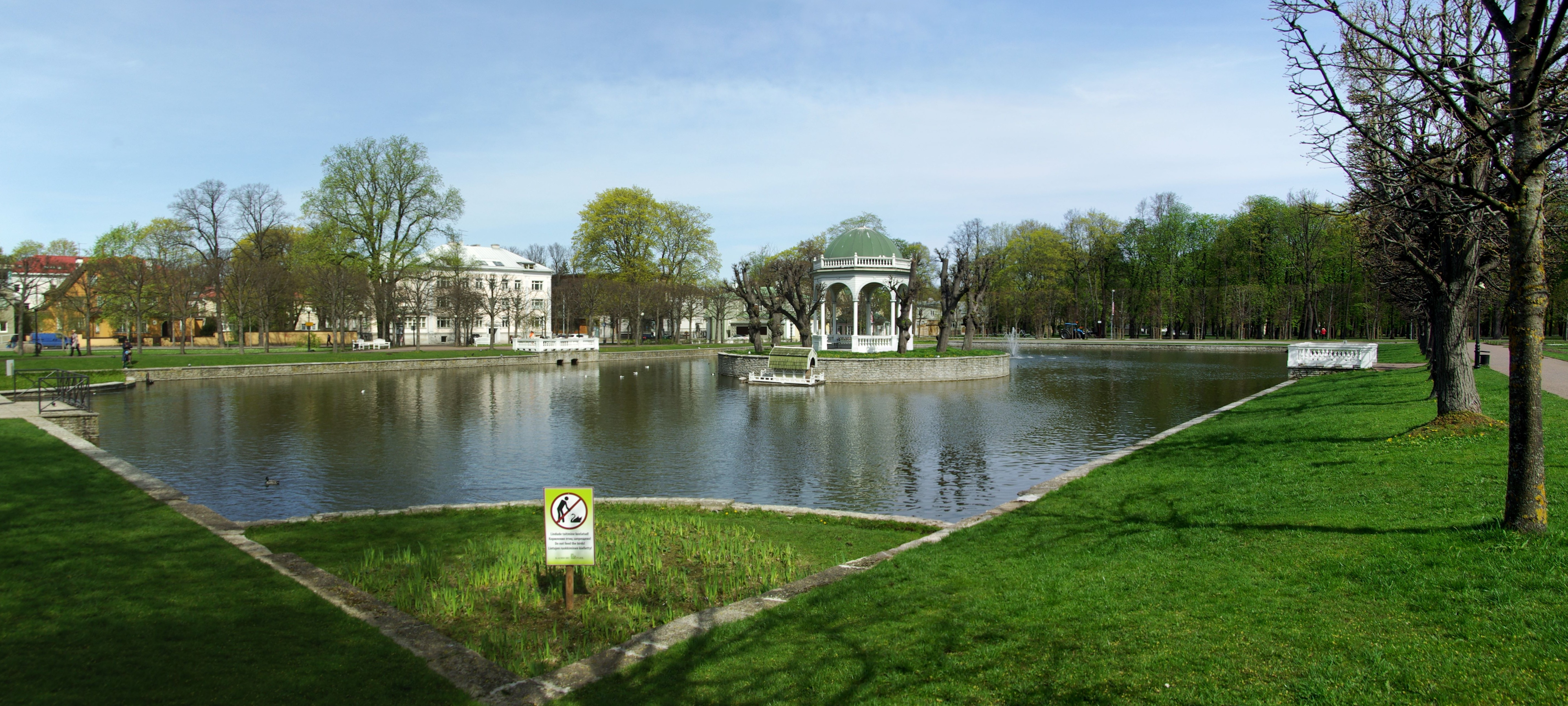 Kadrioru park